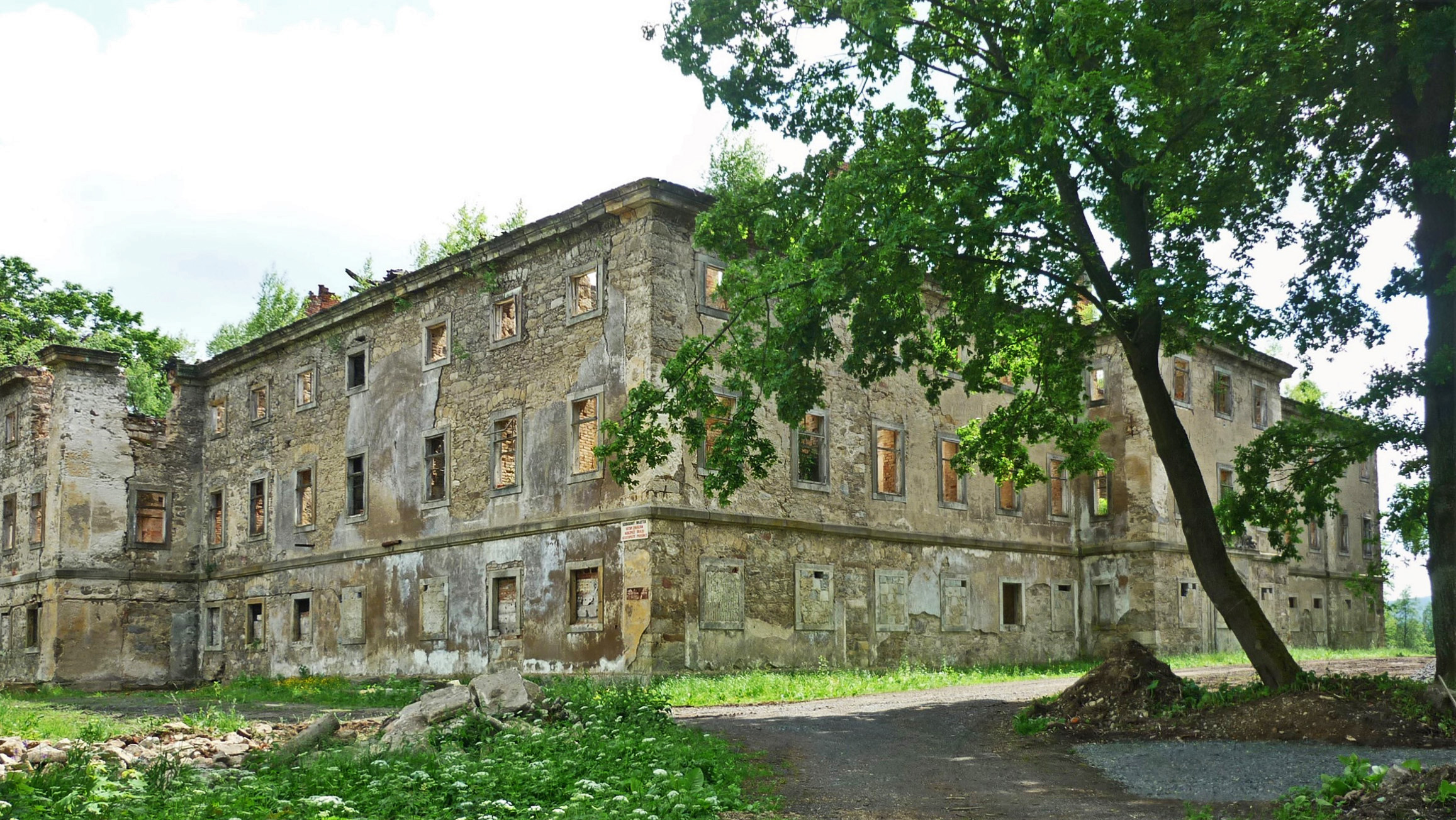 Schlossruine in Hainspach (Lipová) in Nordböhmen